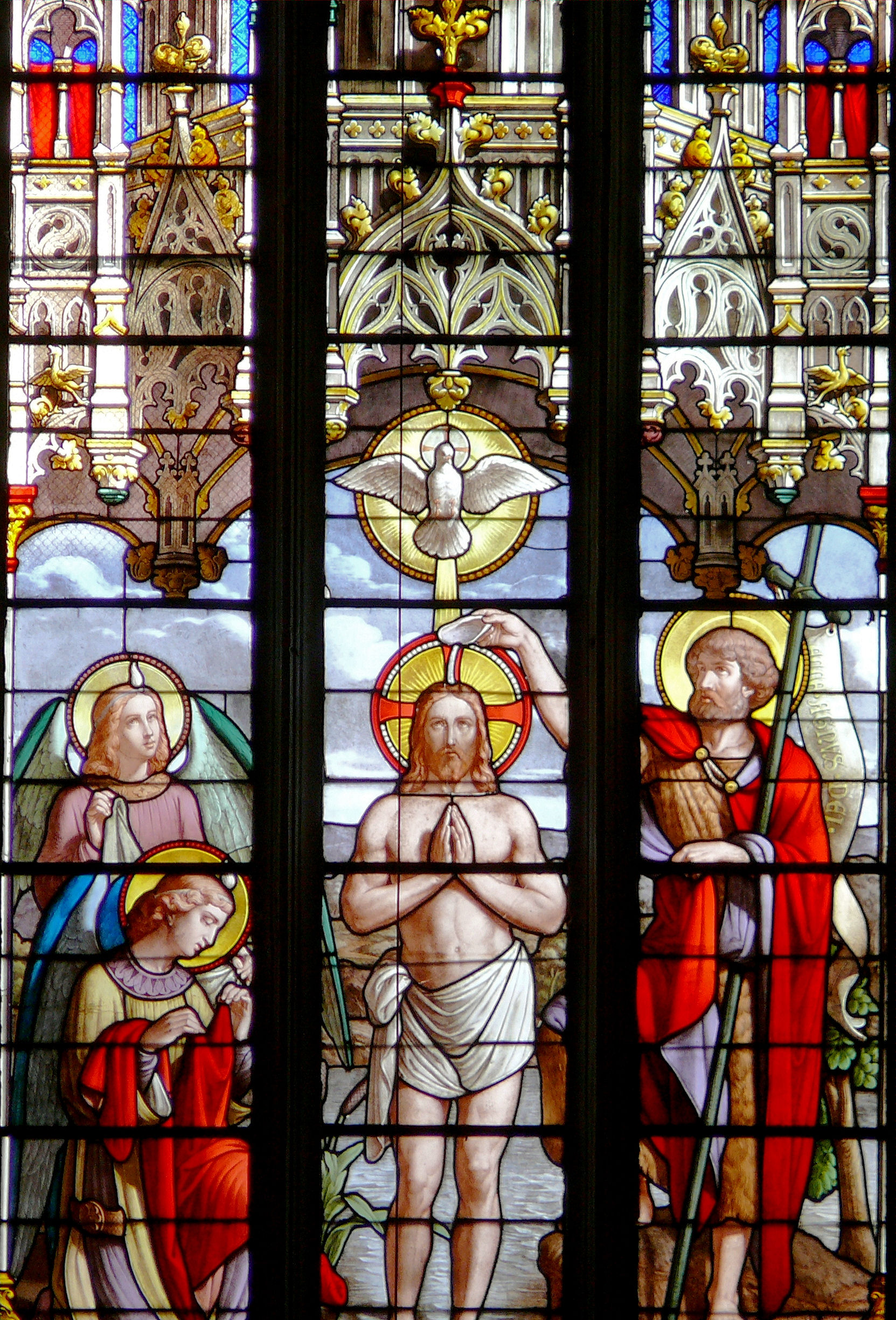 Cathédrale Saint-Jean-Baptiste de Saint-Jean-de-Maurienne - Cathédrale - Vitrail central de l'abside : baptême du Christ